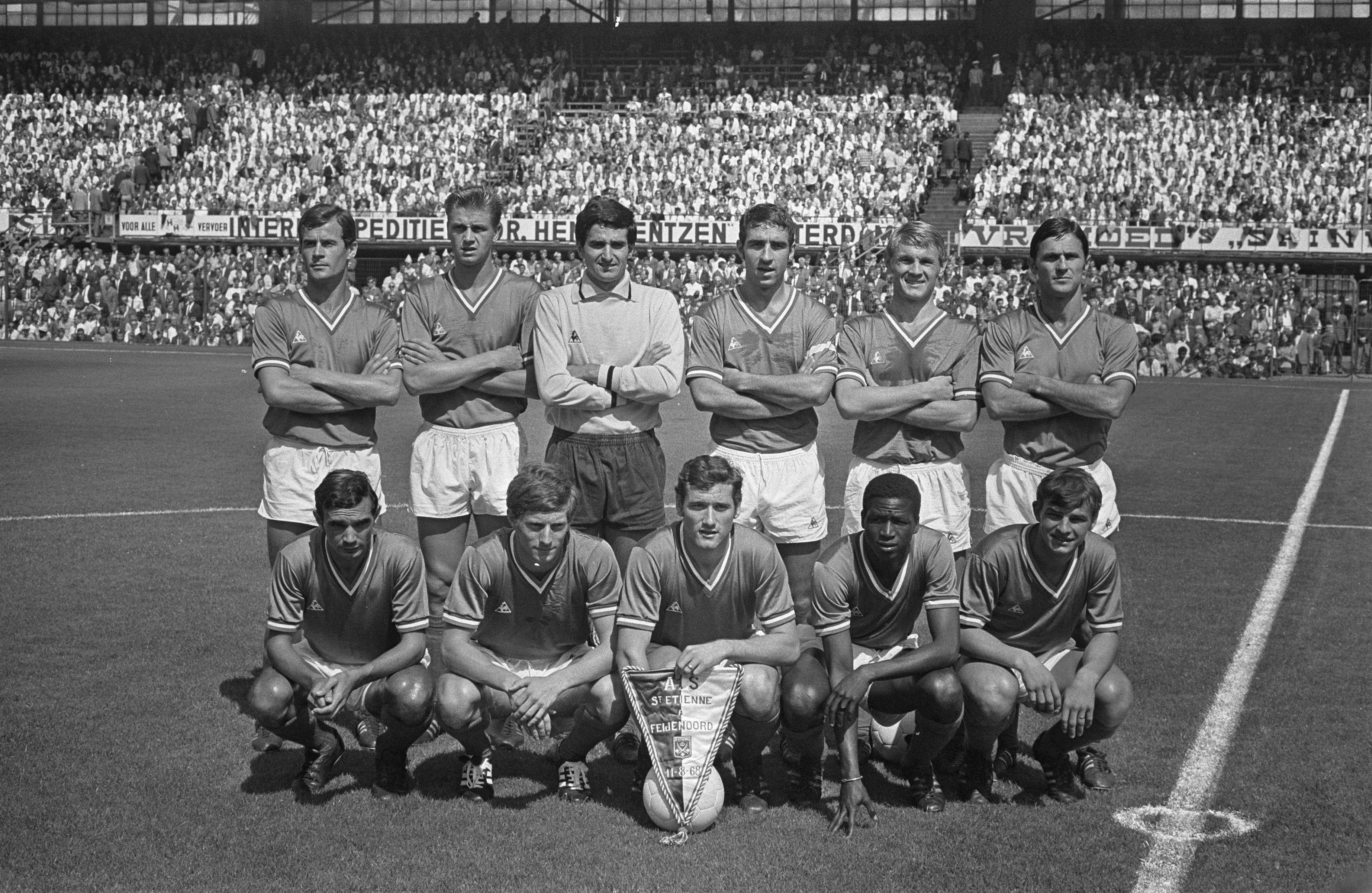 Collectie / Archief : Fotocollectie Anefo Reportage / Serie : Feijenoord - St. Etienne (Frankrijk) Beschrijving : Het elftal van St. Etienne Datum : 11 augustus 1968 Locatie : Rotterdam, Zuid-Holland Trefwoorden : elftallen, groepsportretten, voetbal Fotograaf : Fotograaf Onbekend / Anefo Auteursrechthebbende : Nationaal Archief Materiaalsoort : Negatief (zwart/wit) Nummer archiefinventaris : bekijk toegang 2.24.01.05 Bestanddeelnummer : 921-5880